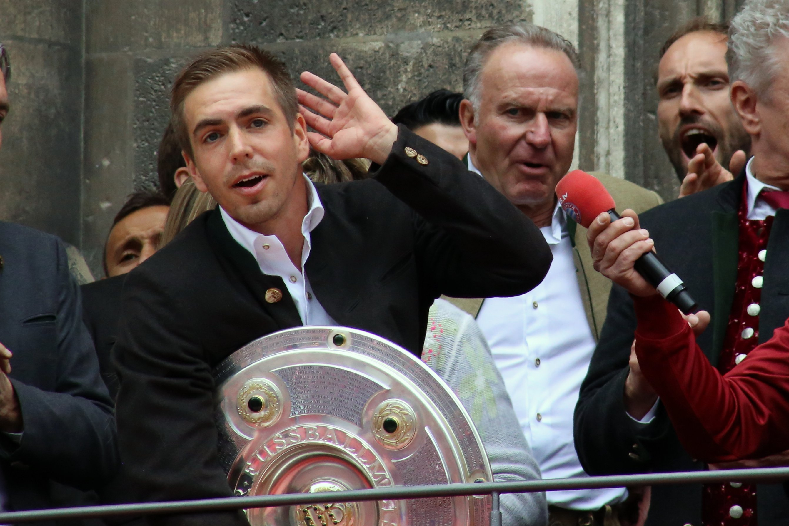 15. Mai 2016: Meisterfeier des FC Bayern - Philipp Lahm, Karl-Heinz Rummenigge und Tom Starke mit anderen Personen auf dem Münchner Rathausbalkon